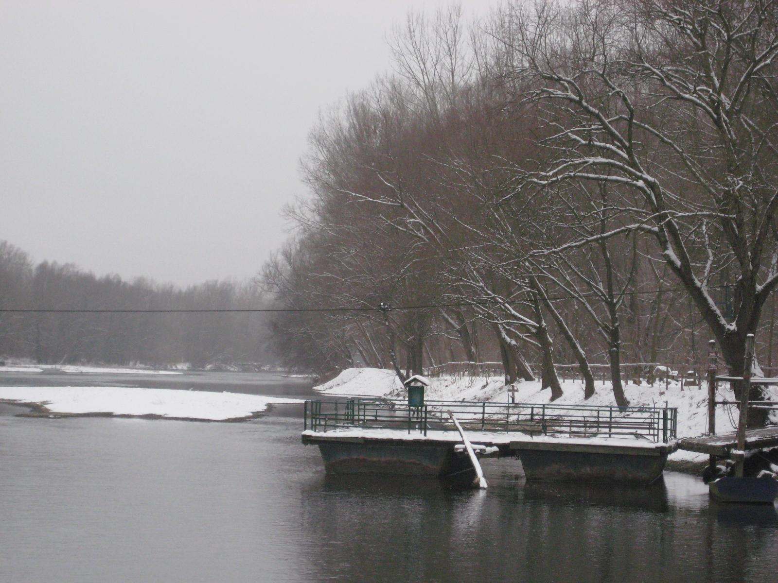 Island of love on Mura river (near Ižakovci), Slovenia